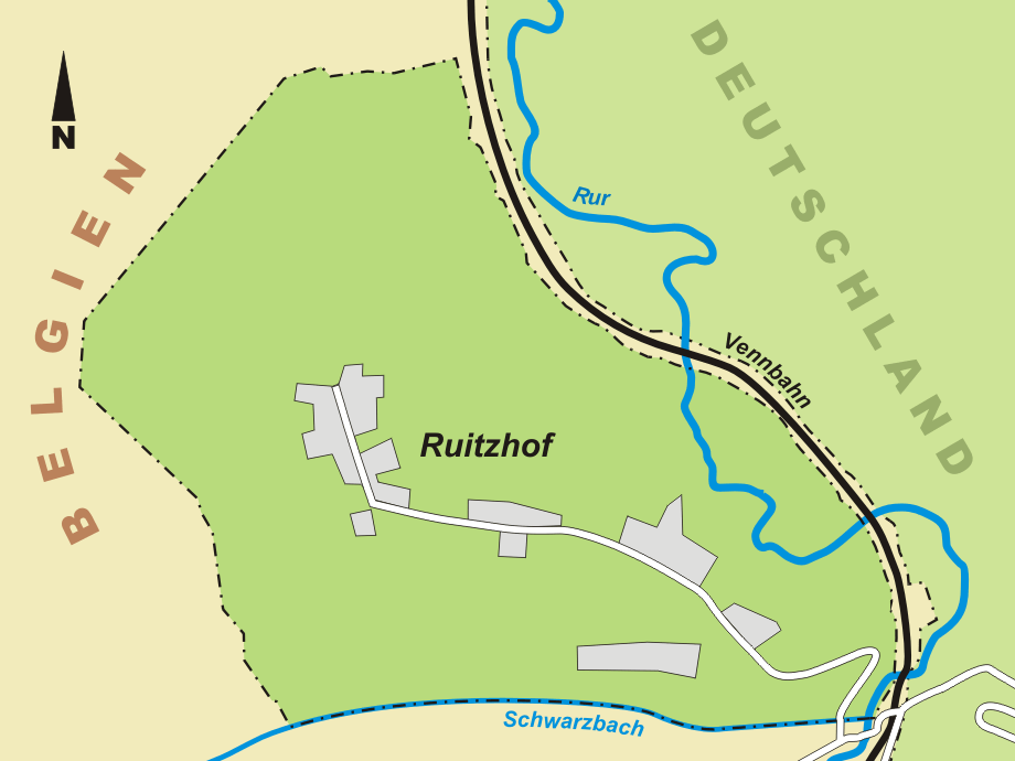 Karte der deutschen Exklave Ruitzhof in Belgien.